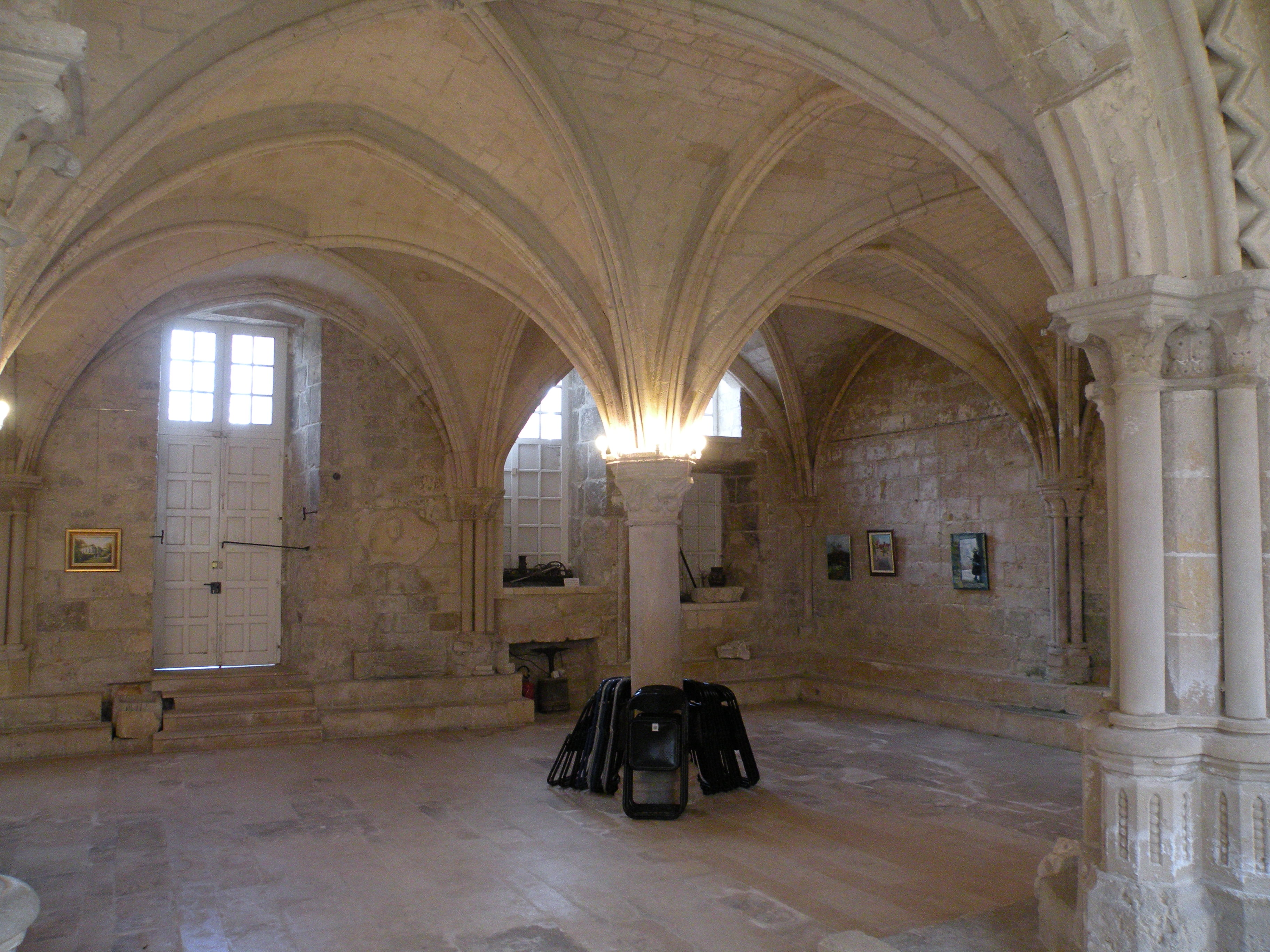 Salle capitulaire.